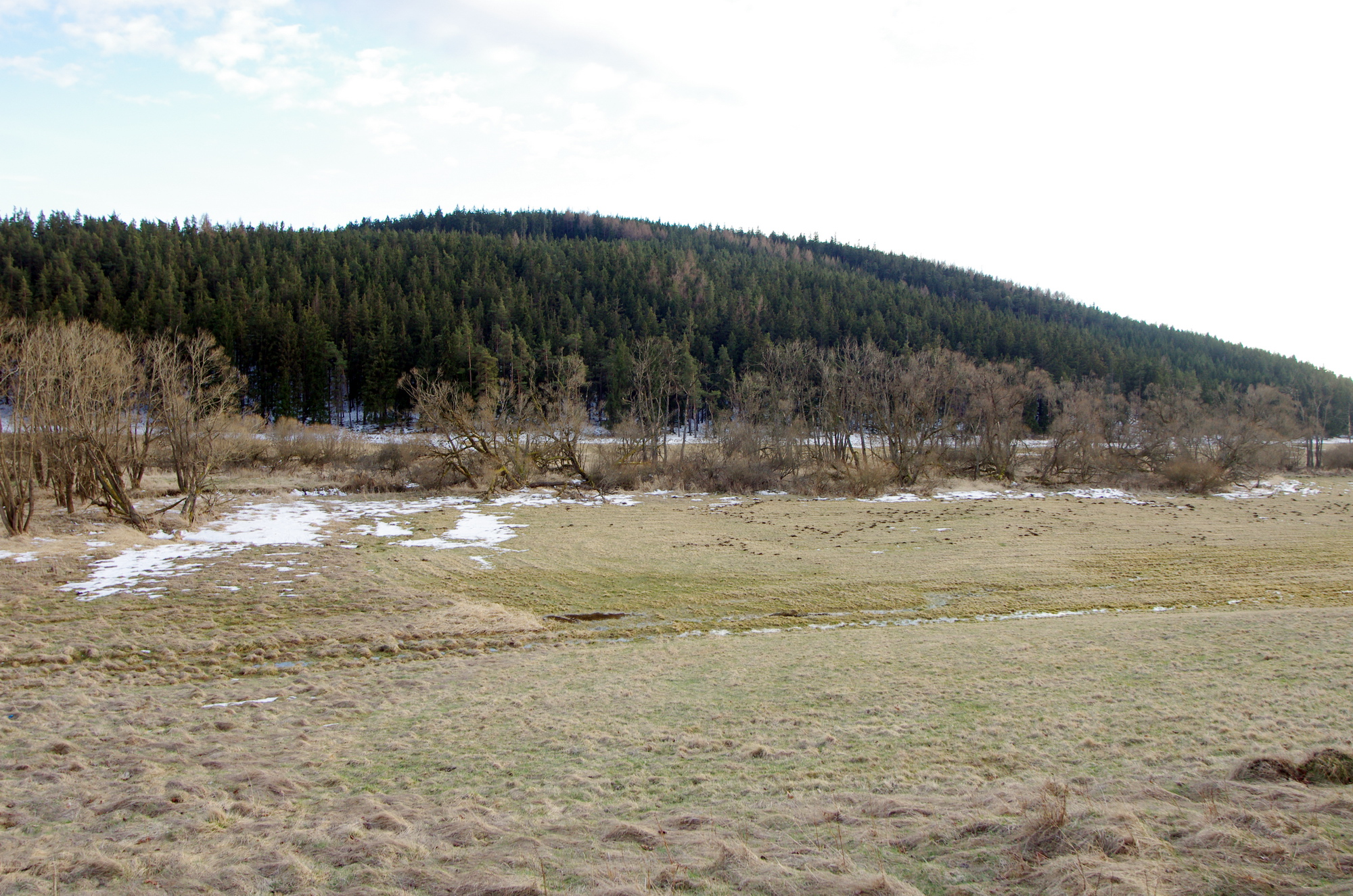 Vlčí hřbet, s vrcholem Vlčí kámen 883 m n. m., Slavkovský les, okres Cheb